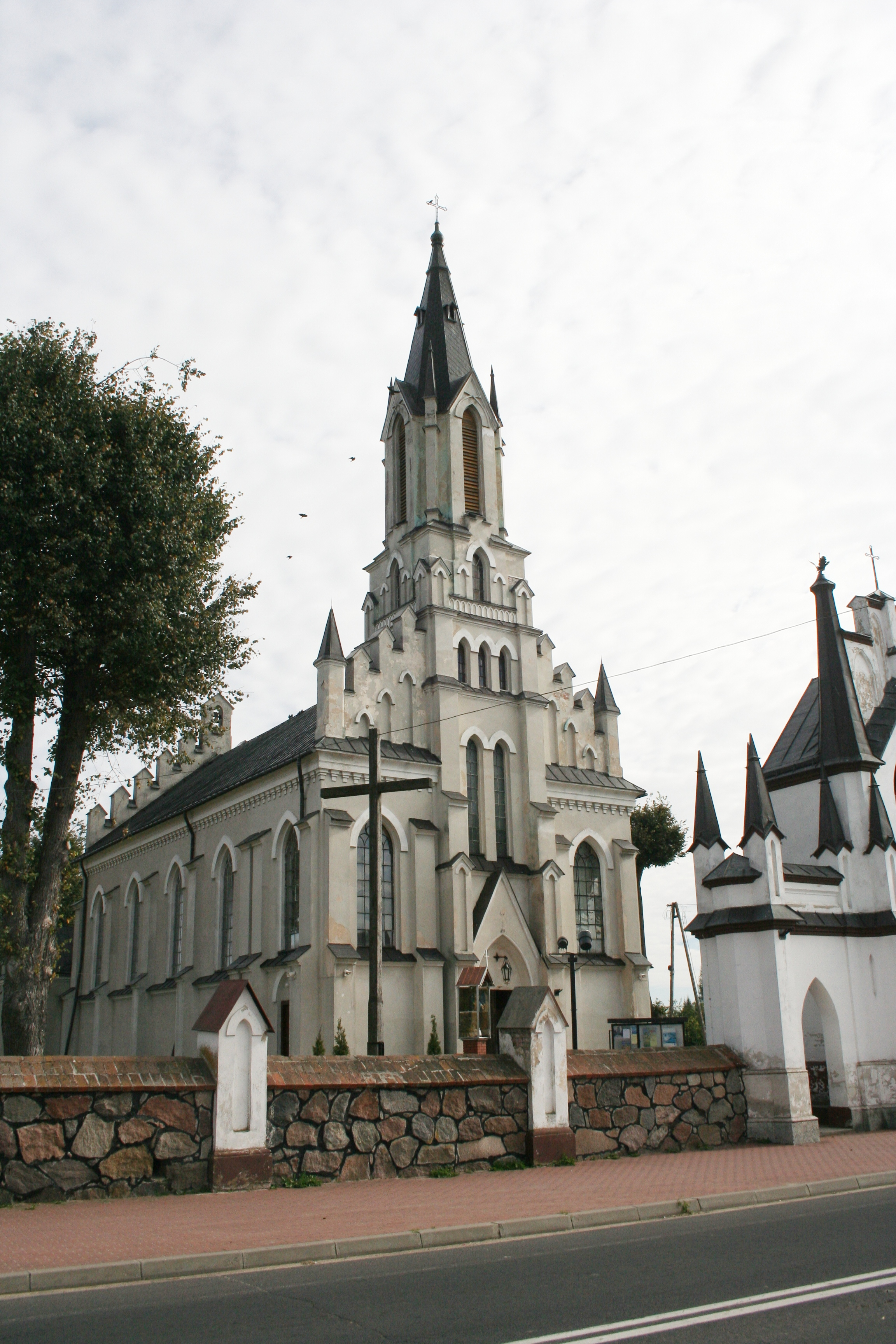 Stara Kornica - zespół kościoła parafialnego pw. Niepokalanego Poczęcia NMP, 1905 (zbytek nr A-272)